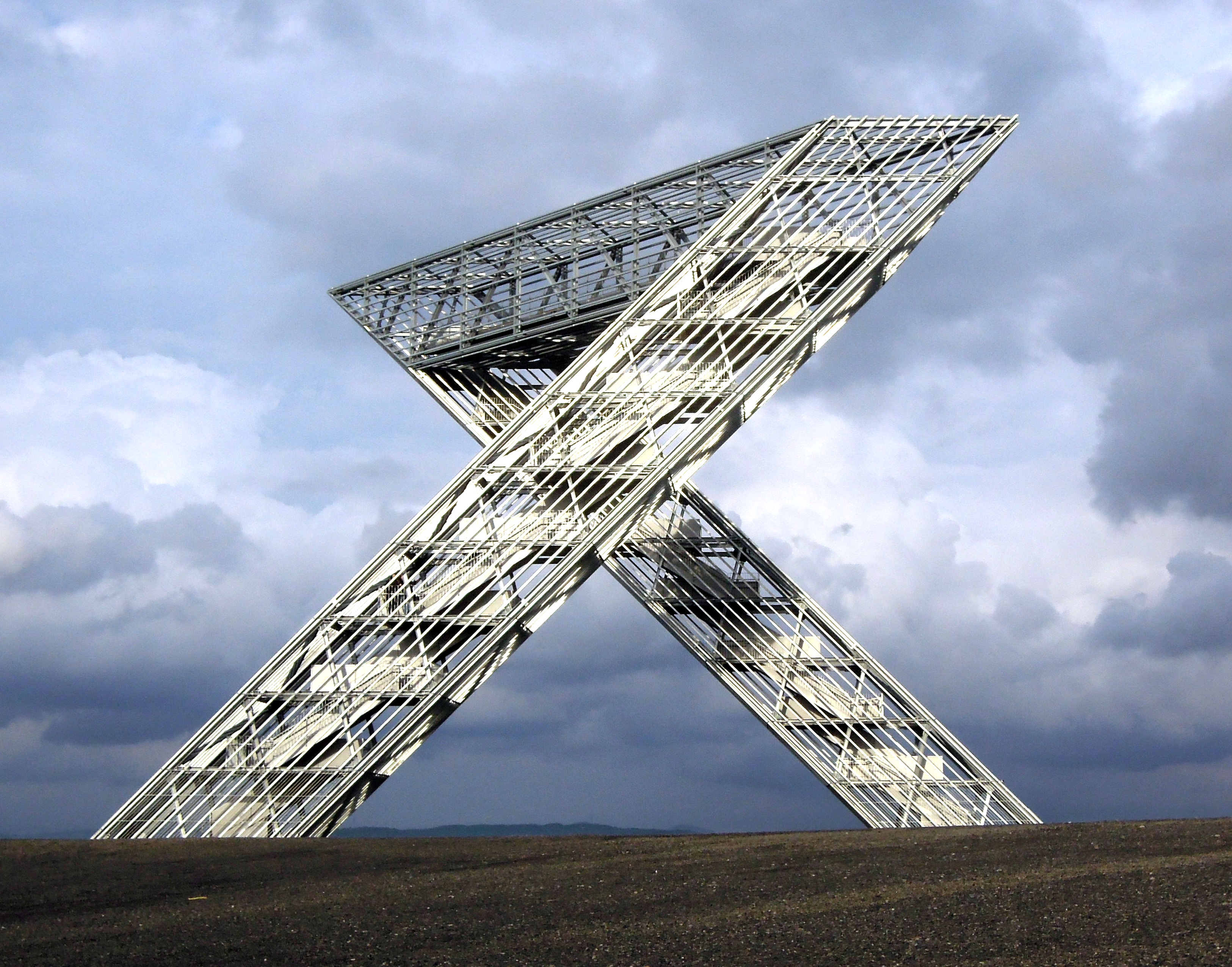 Blick von Westen